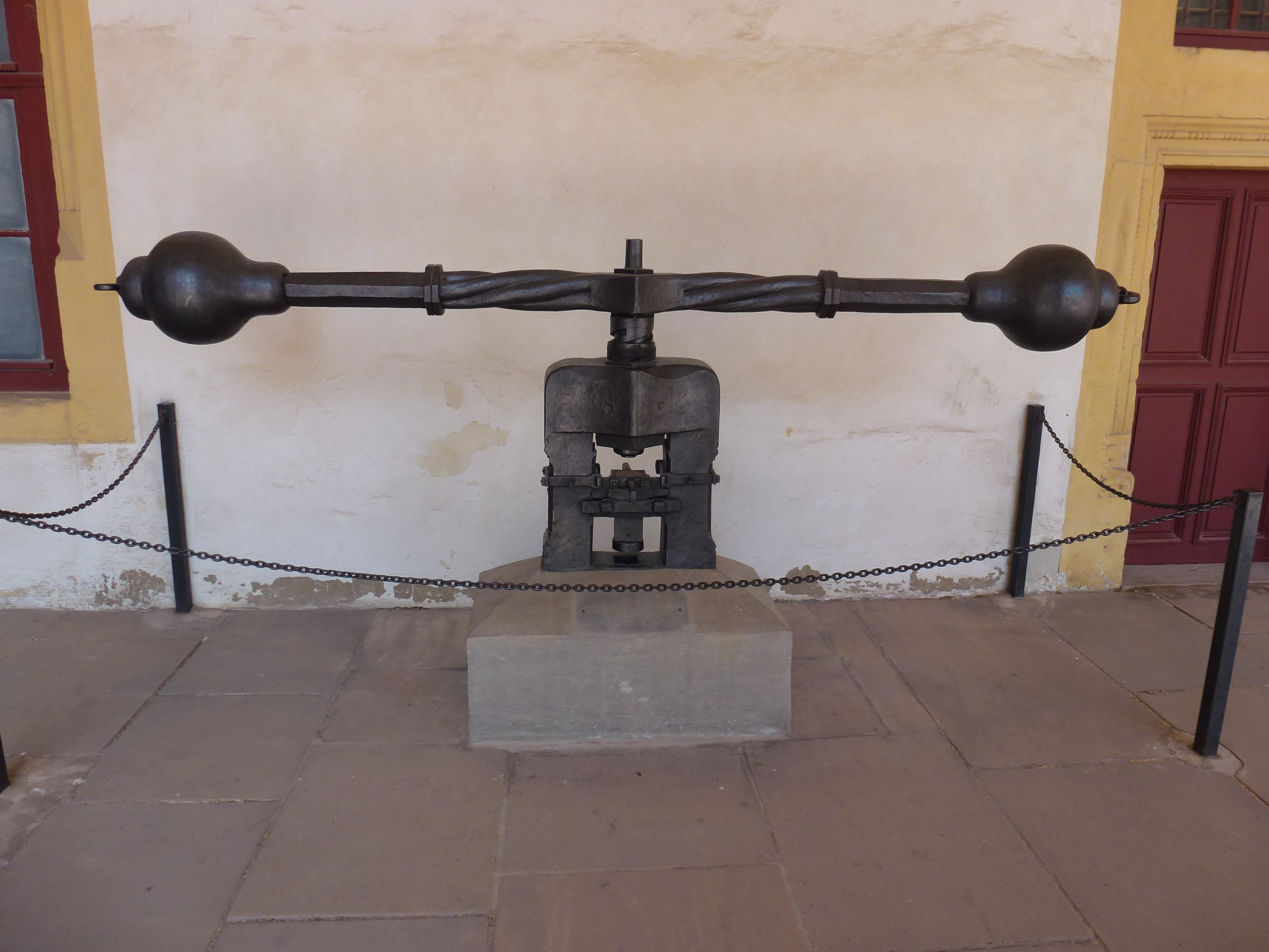 Großes Prägewerk der Münzstätte Gotha, Mitte des 18. Jahrhunderts